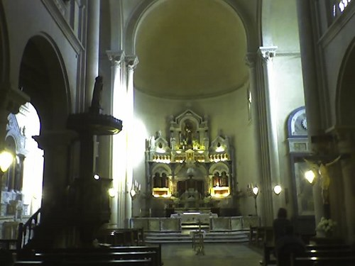 Iglesia de San Antonio de Padua, Merlo, provincia de Buenos Aires.